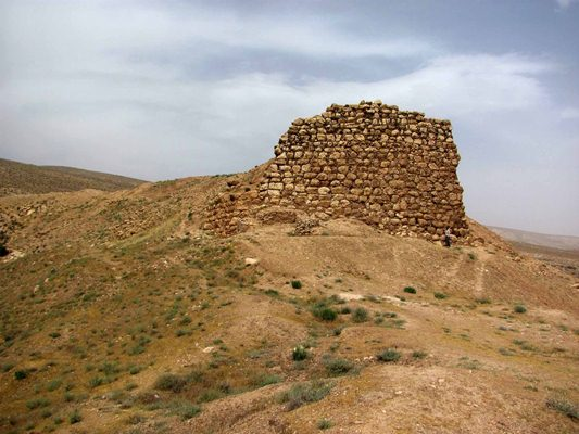 نمای قصرابونصر